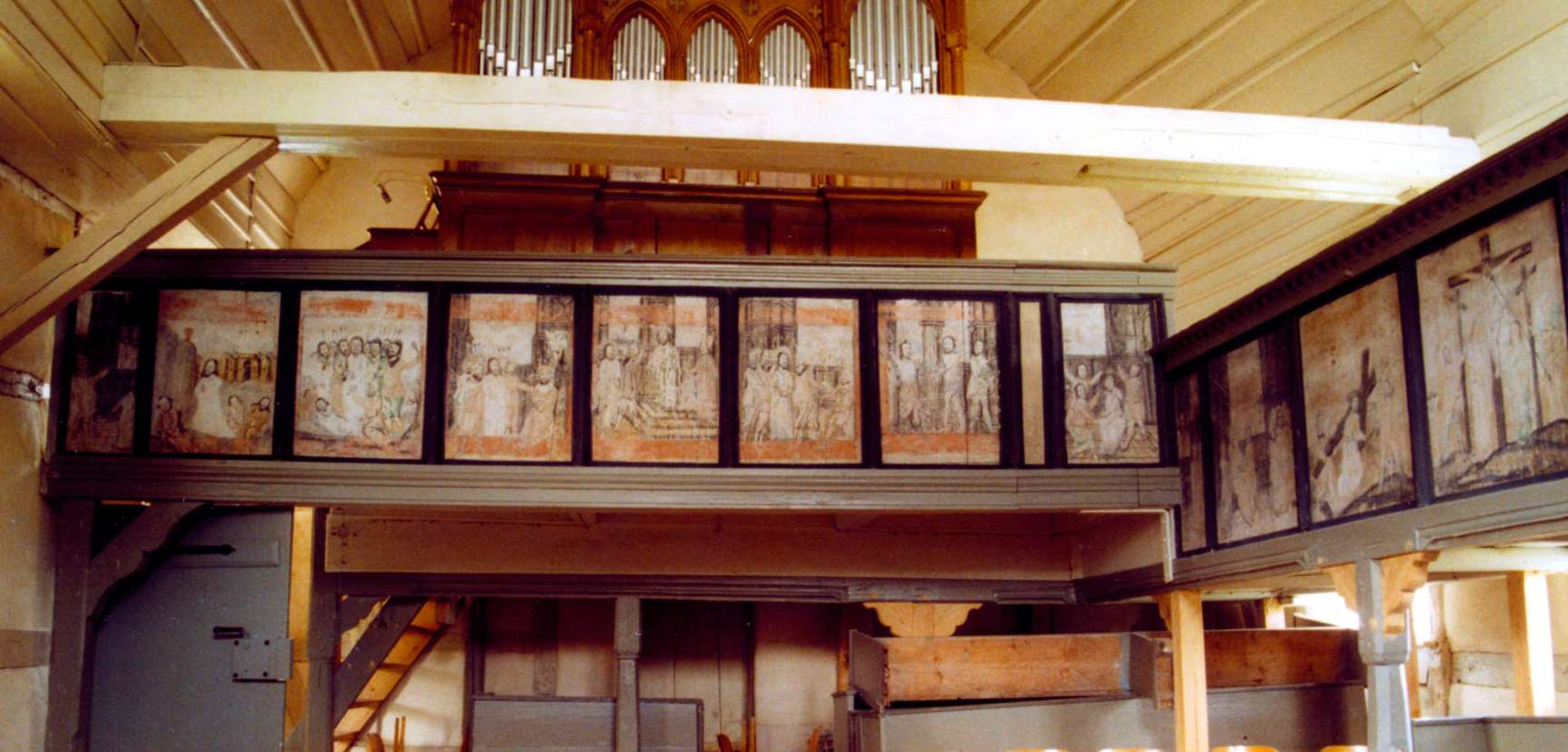 Kirche in Wieserode, Bemalung der Emporenbrüstungen